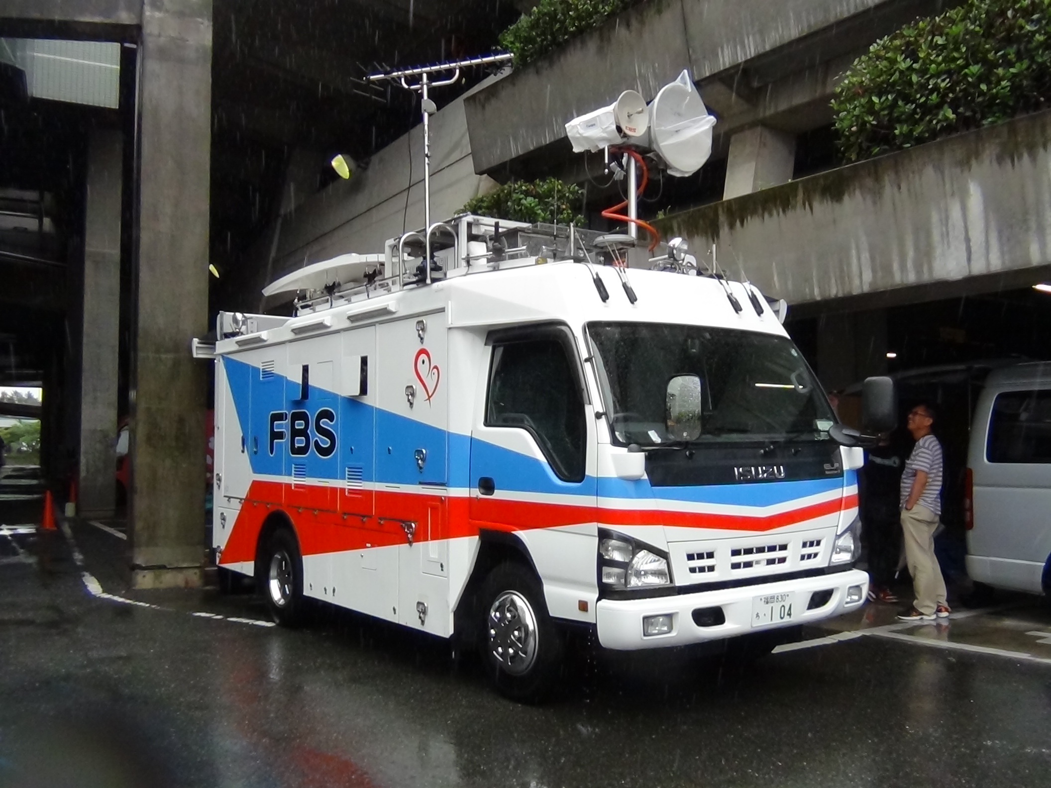 福岡放送SNG・FPU両用中継車。